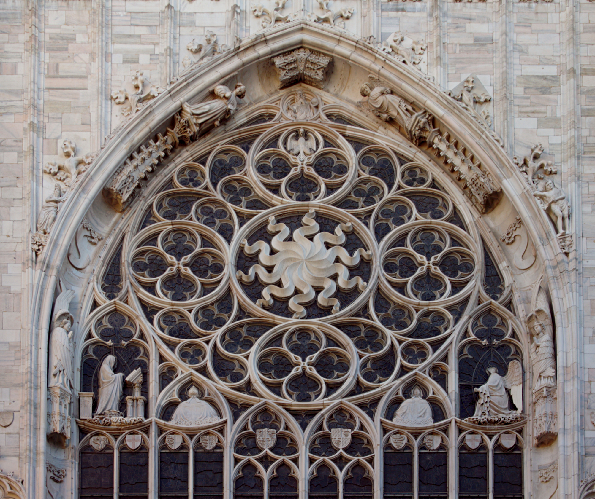 Detalhes da Catedral de Mião